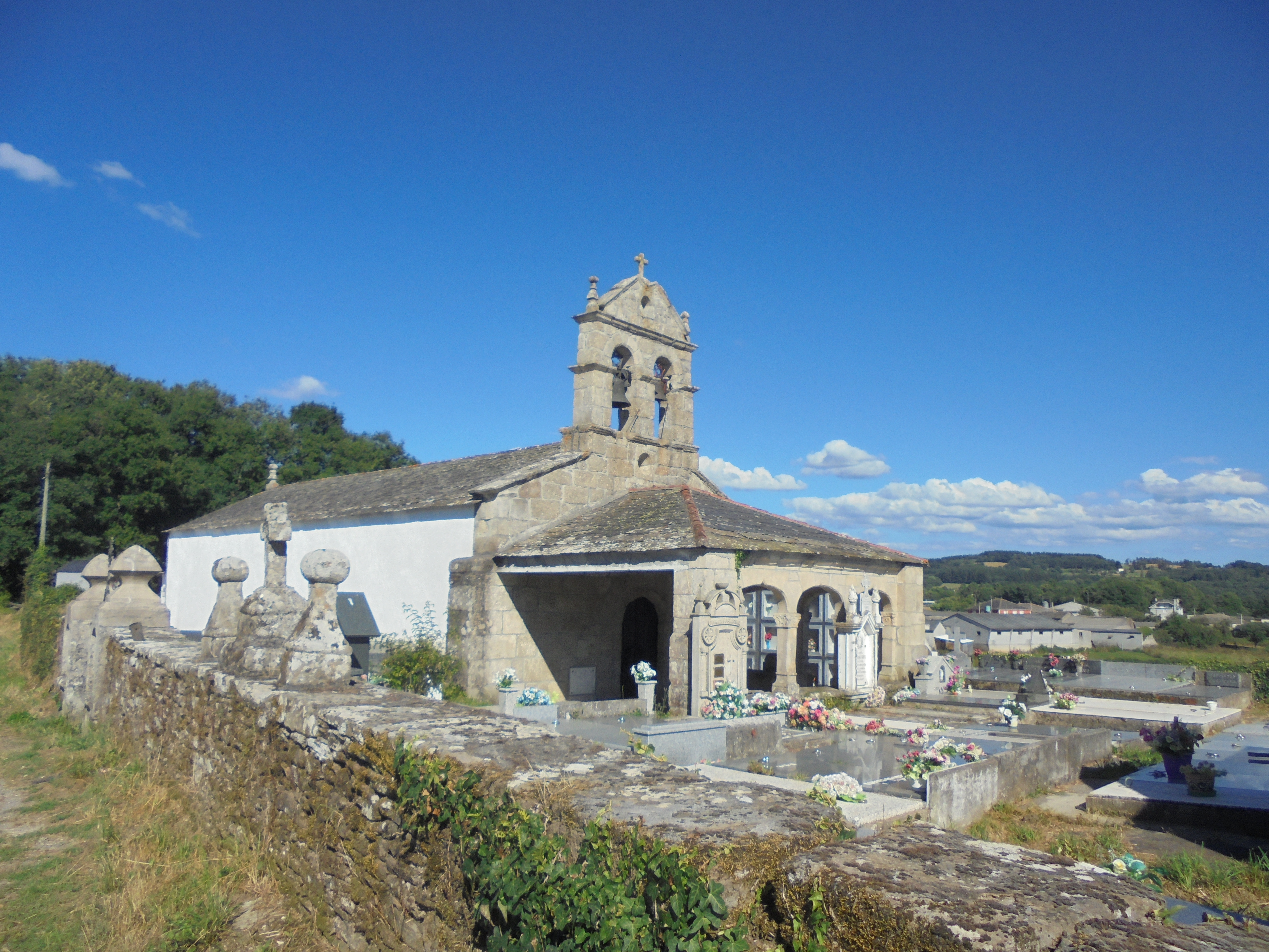 Igrexa parroquial de Marei ( O Corgo)